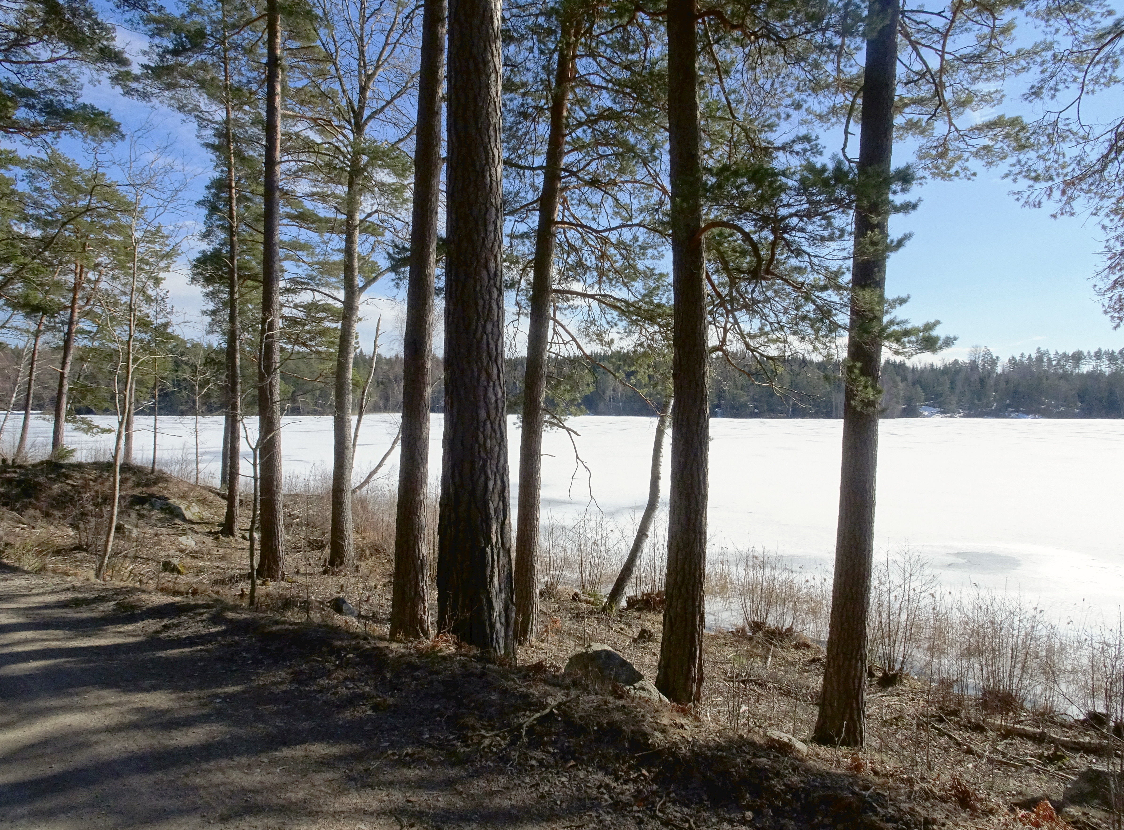 Bjursnäs, Björnlunda, kvarnsjön